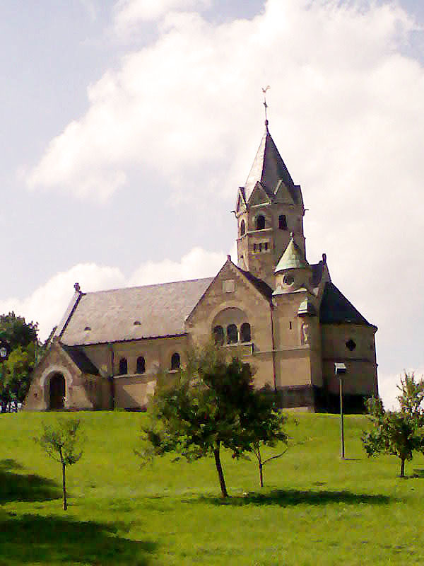 Erlöserkapelle in Mirbach/Eifel (Südseite)